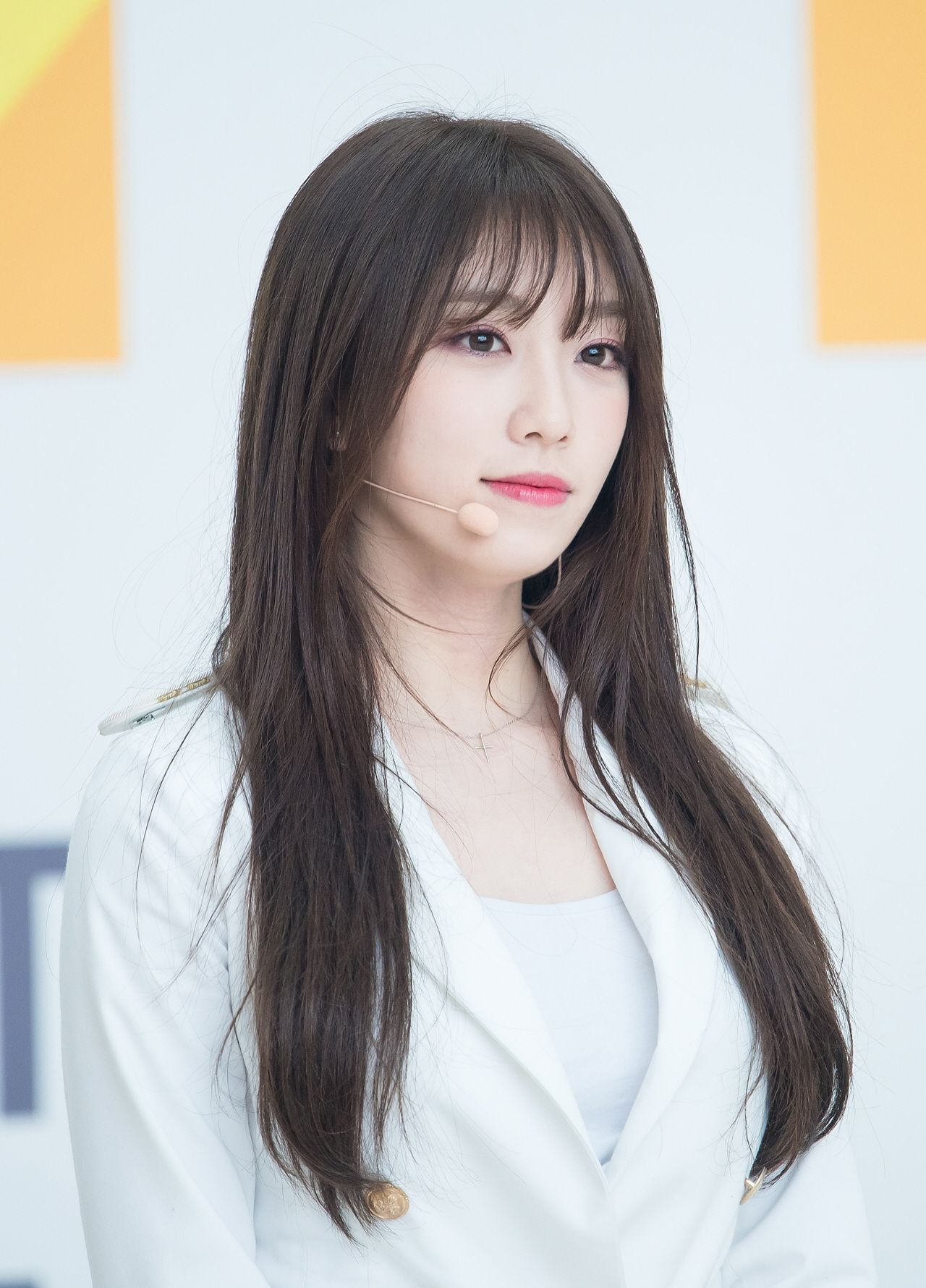 180211 더유닛 유닛G